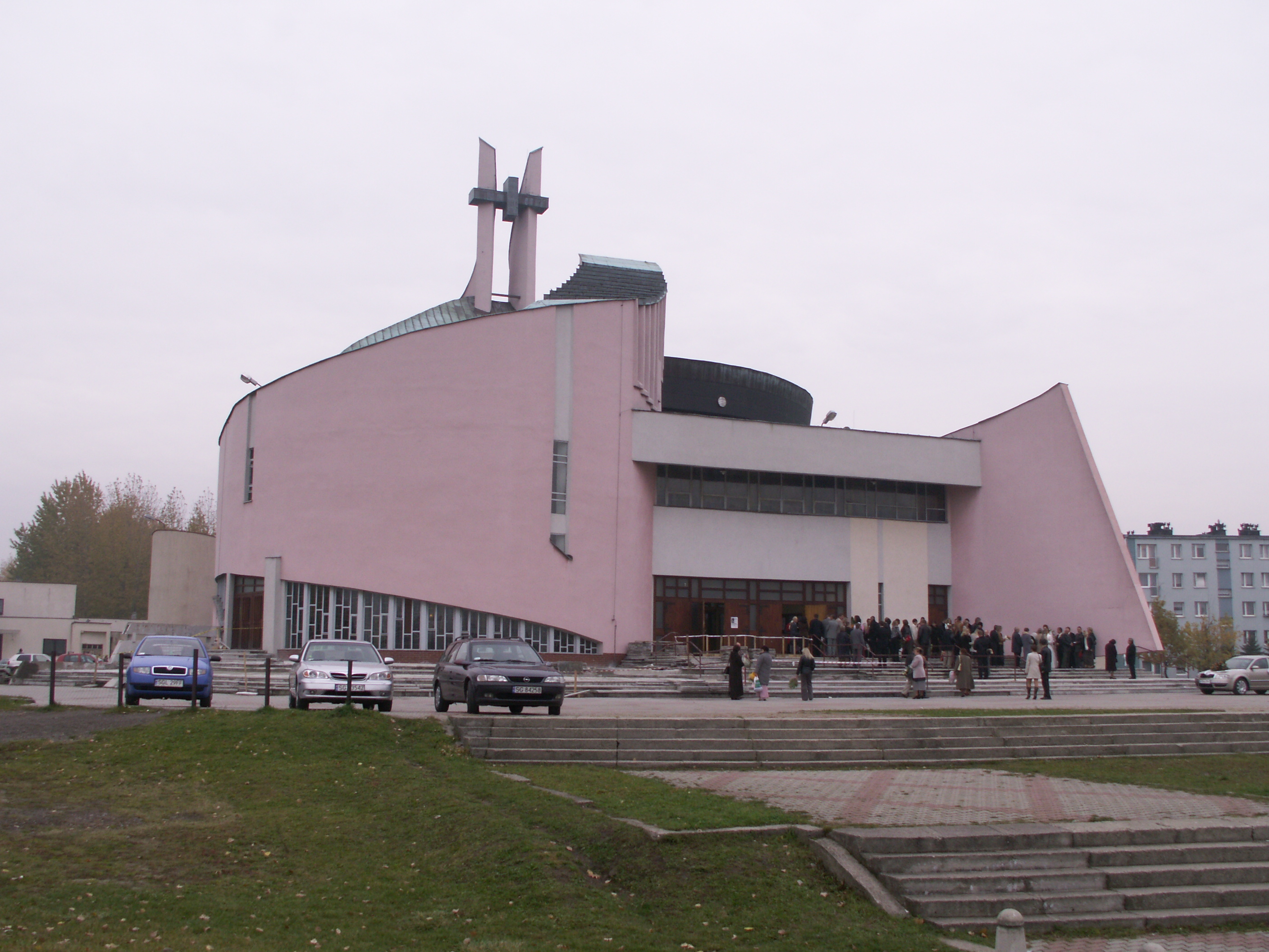 Kościół pw. MB Częstochowskiej w Knurowie.